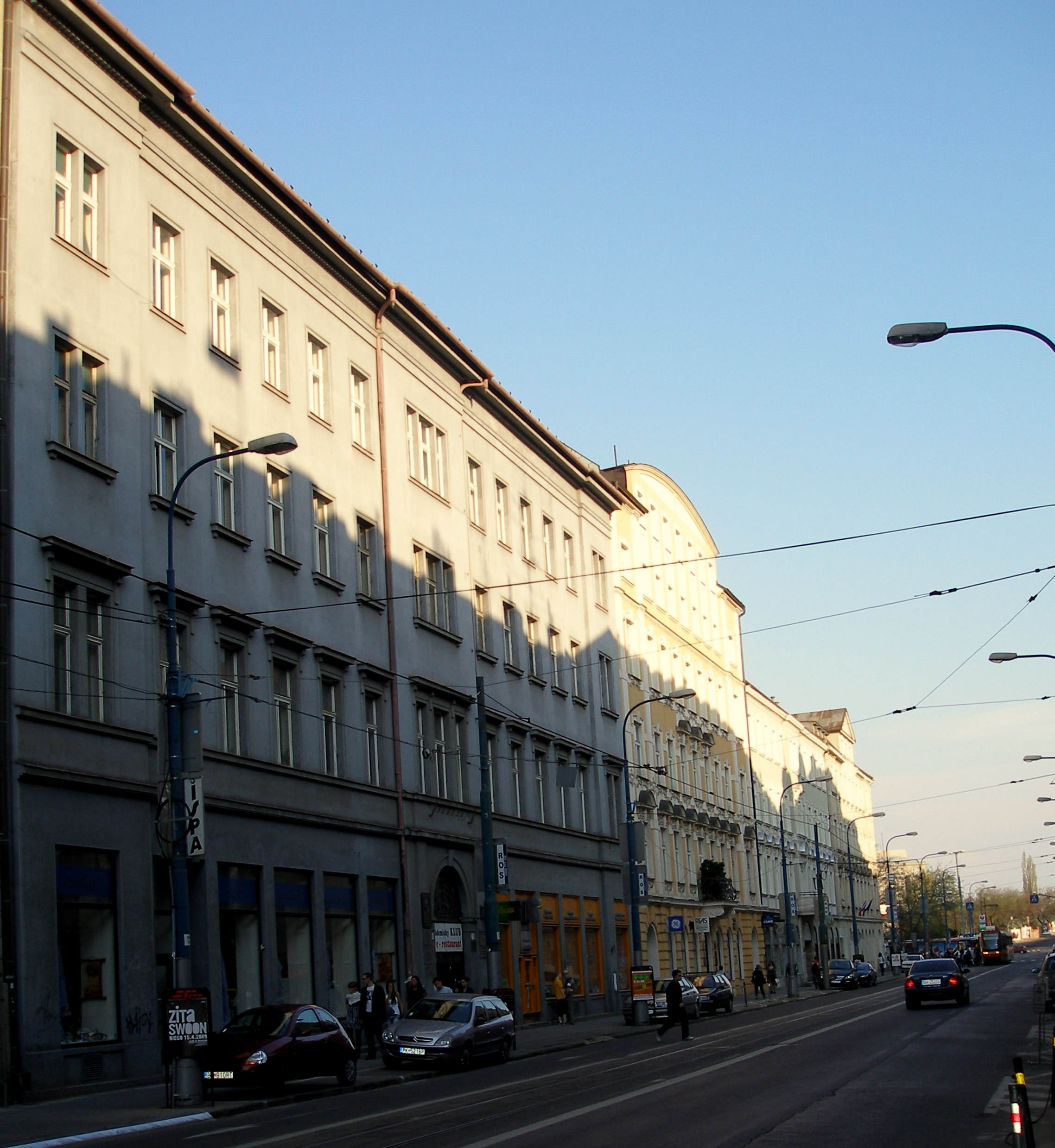 Ulica Štúrova v Bratislave na veľkonočný Veľký piatok 2009.